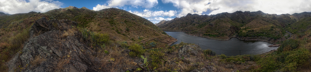 Presa de Tahodio